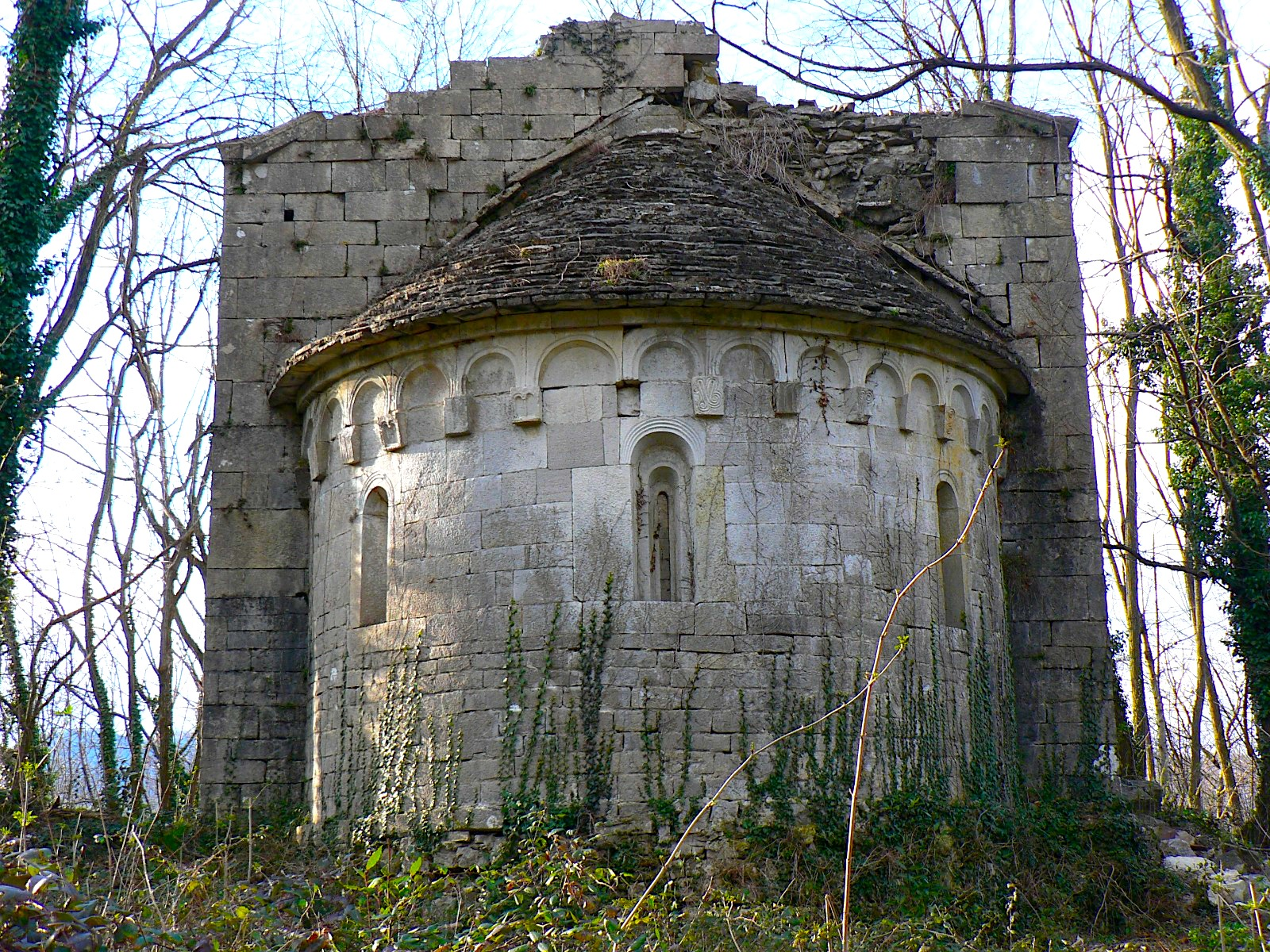 SS Giusto e Clemente di Puticiano (Abside)